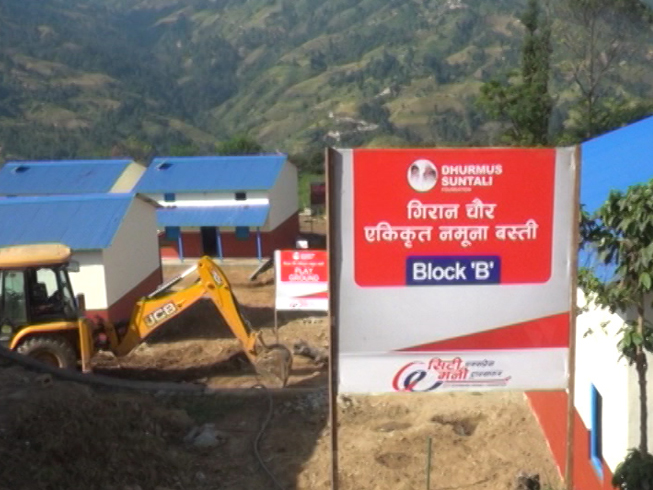 नेपाली: गिरान चौर एकीकृत नमूना बस्ती